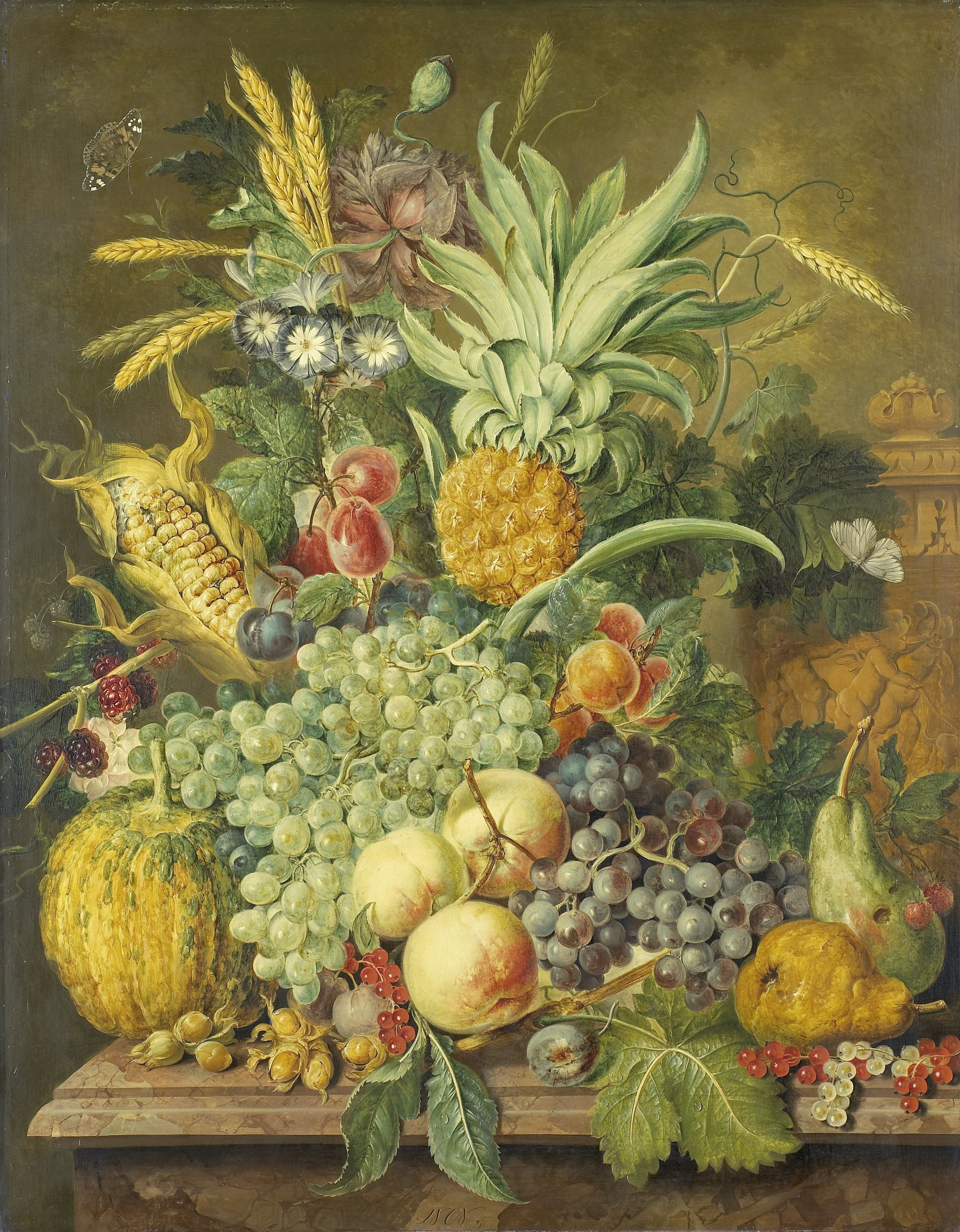 Stilleven met vruchten. Op een marmeren plint een stilleven met ananas, maïs, druiven, peren, bessen, hazelnoten, sinaasappels, abrikozen, een meloen, bramen en pruimen. Daarnaast zijn ook enkele bloemen, takken met bladeren en vlinders aanwezig. Rechts een vaas met putti.